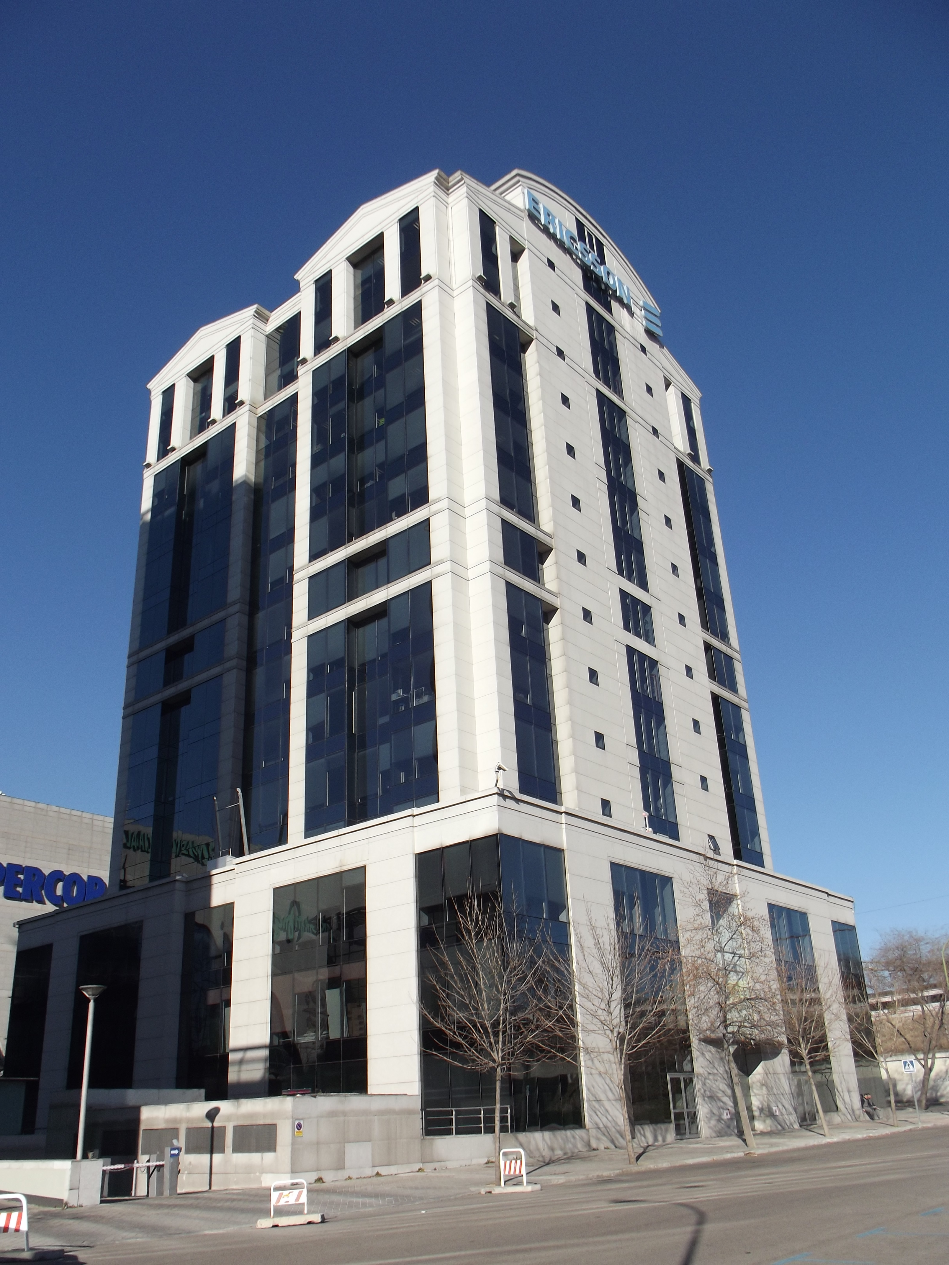 Vista del edificio del número 1 de la Calle Retama desde la calle Acanto (Madrid).